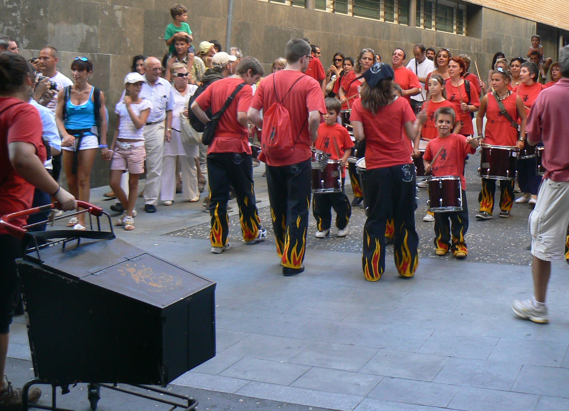 Correfoc infantil a lestes majors del barri de Gràcia (Barcelona) de 2010.